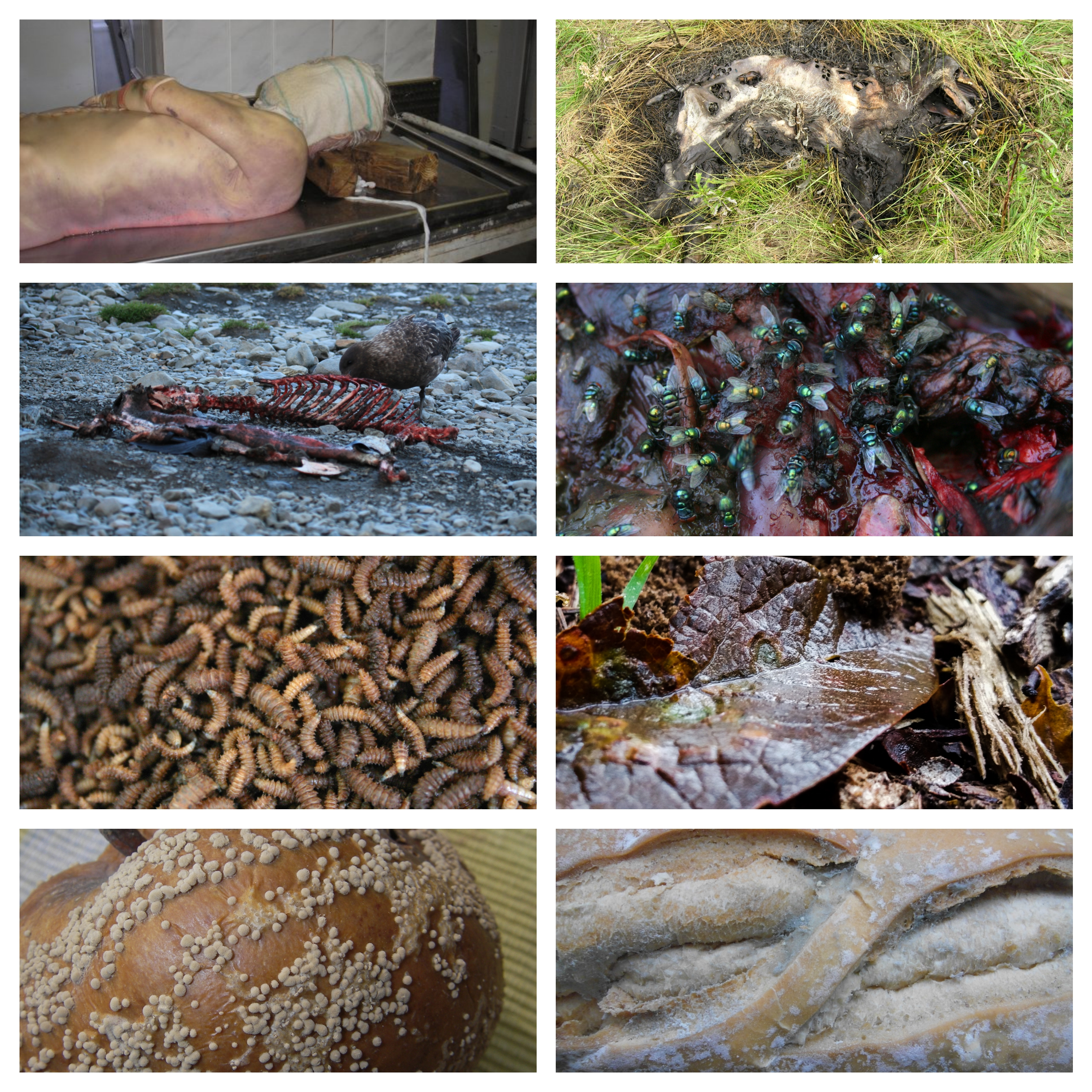 Collauge for decomposition.